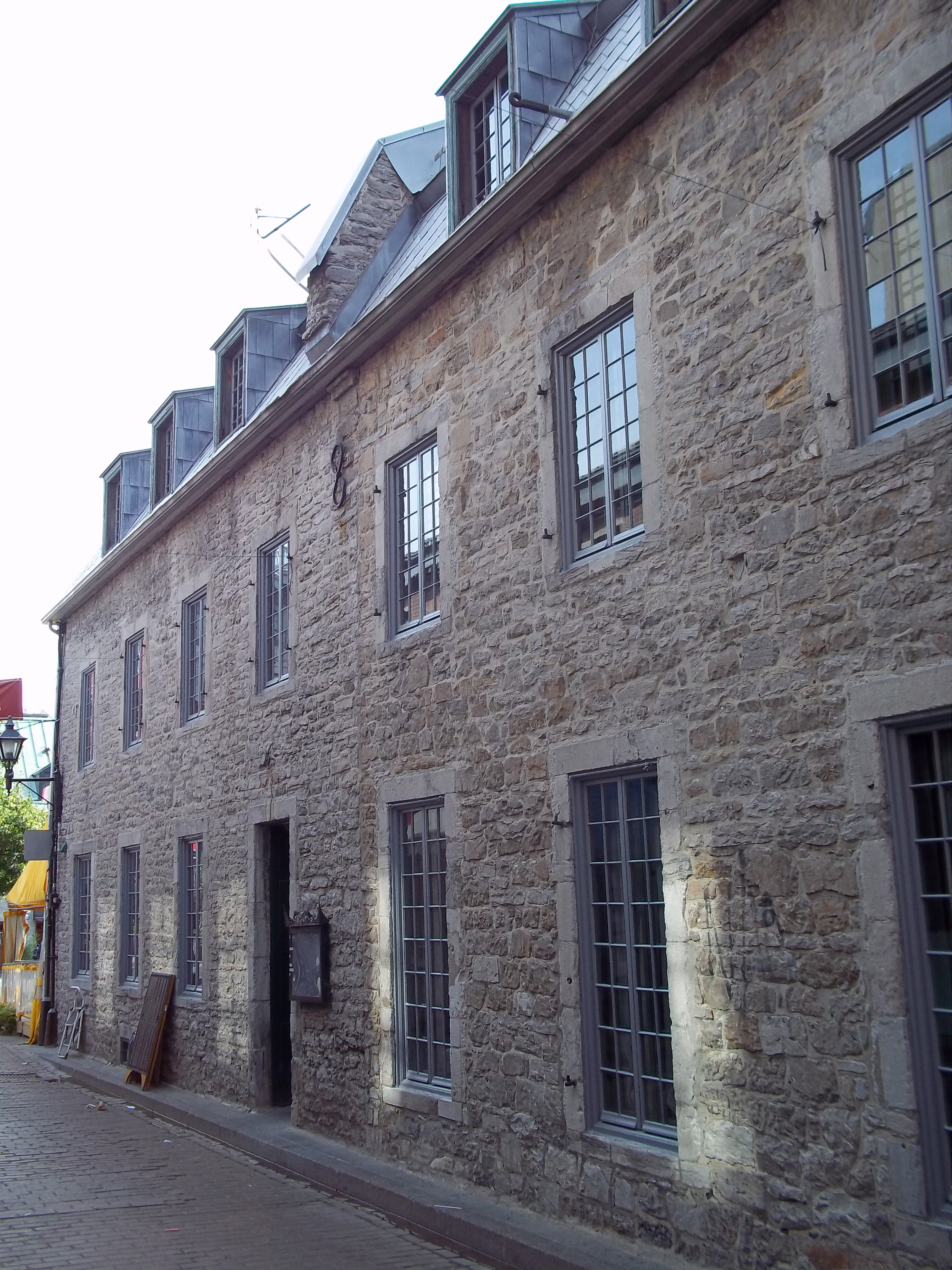 Maison Perrine-Charles-Cherrier, 410, place Jacques-Cartier, et rue Saint-Amable (façade latérale sans numéro civique), Vieux-Montréal info